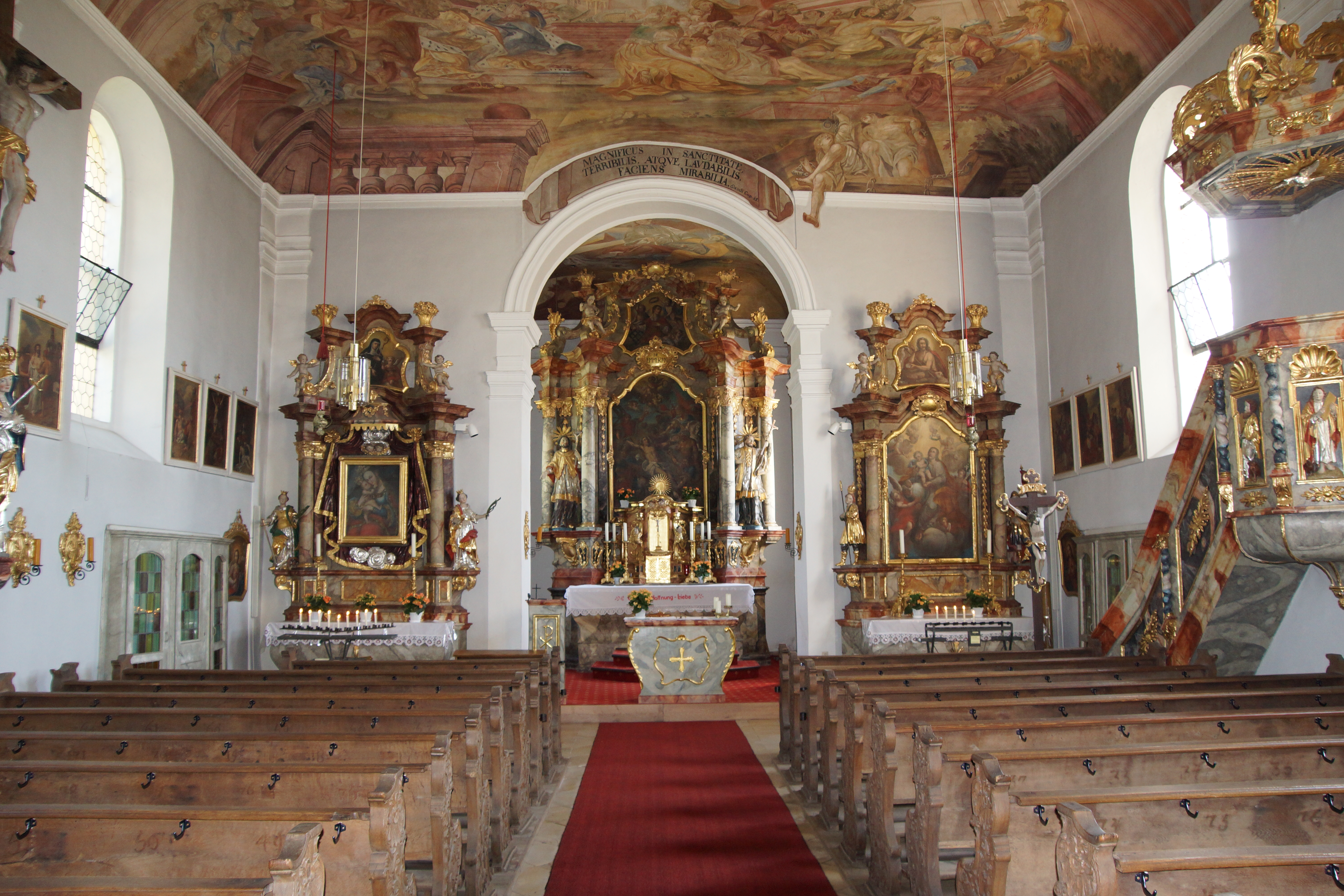 Die Pfarrkirche St. Emmeram in Oberkölblitz